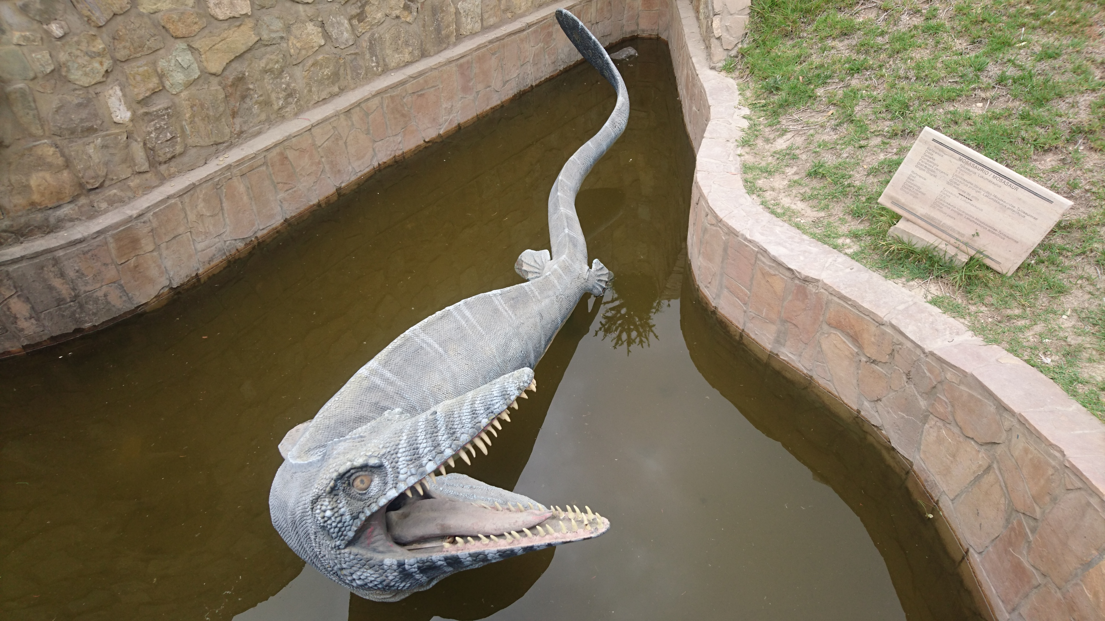 Cerro de Cal Orcko de la localidad de Quila Quila This medium shows the protected monument with the number H/00-238 in Bolivia.